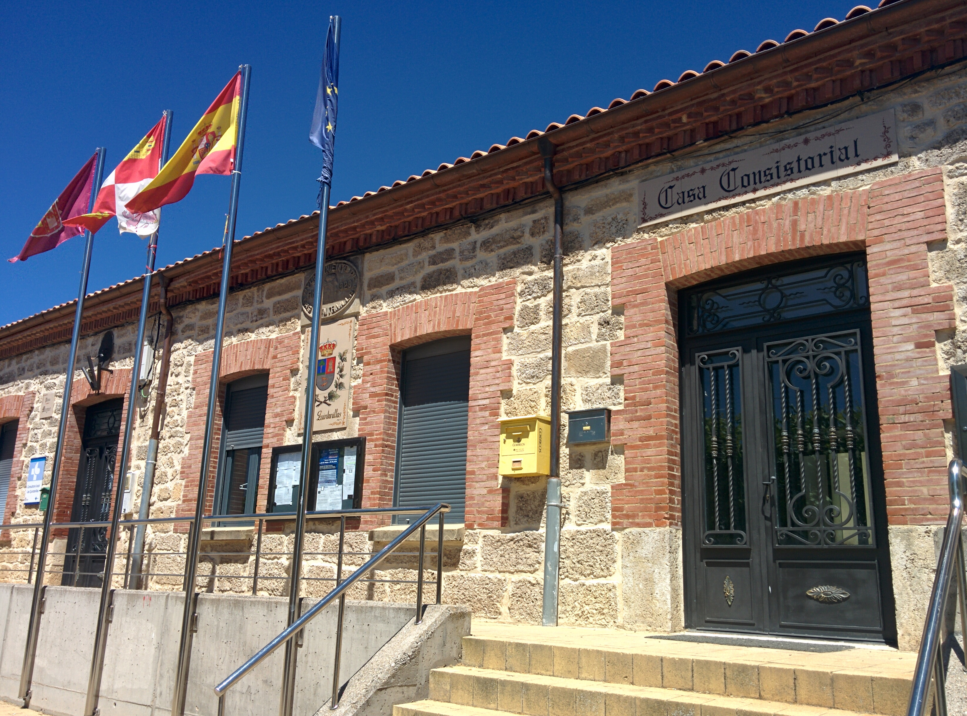 Casa consistorial de Las Quintanillas (Burgos, España).